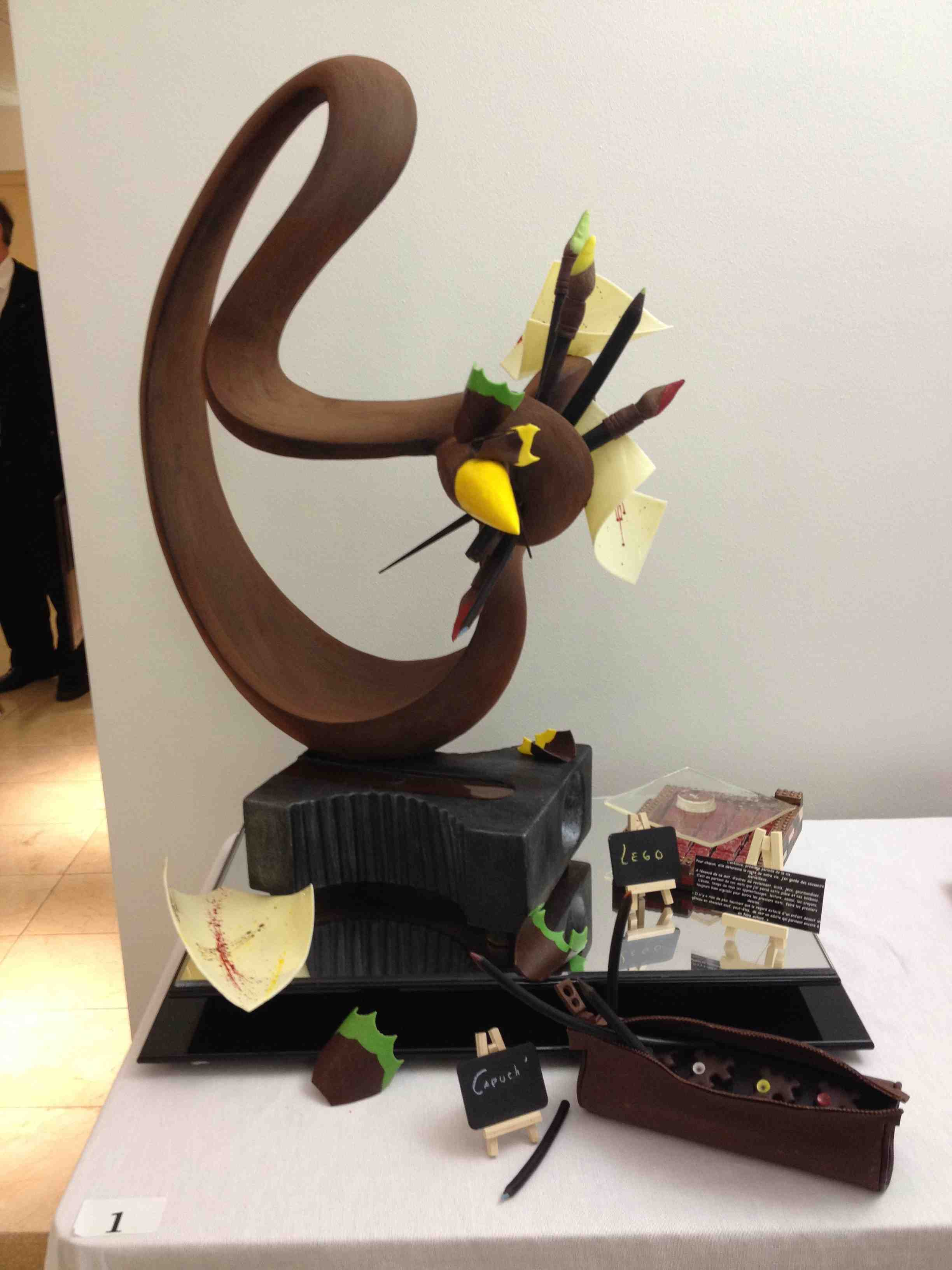 Piece de Martin Ducout